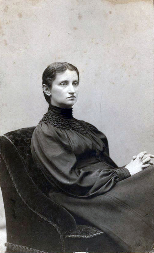 Кобилянська Ольга